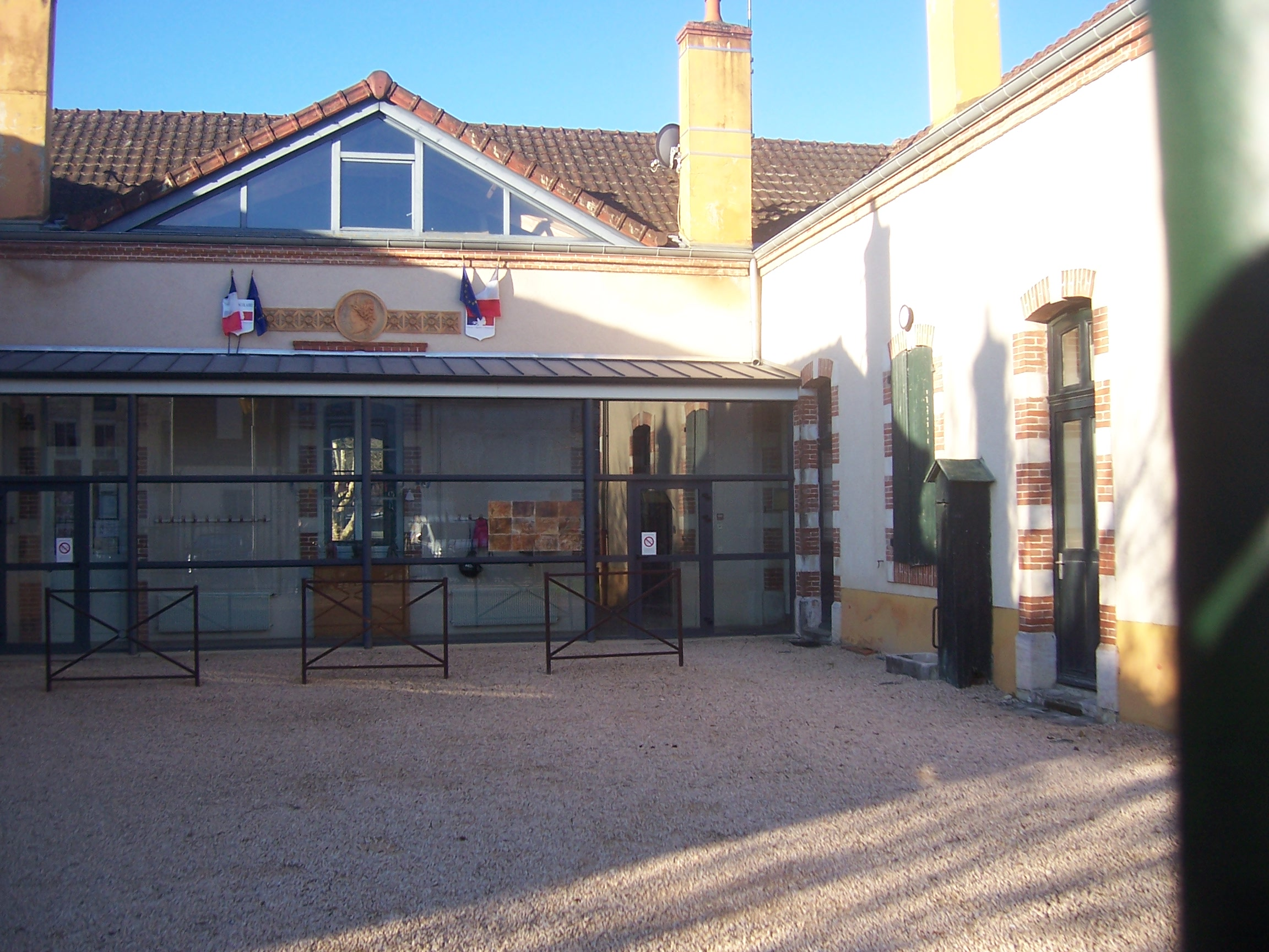 Mairie de Mercurey